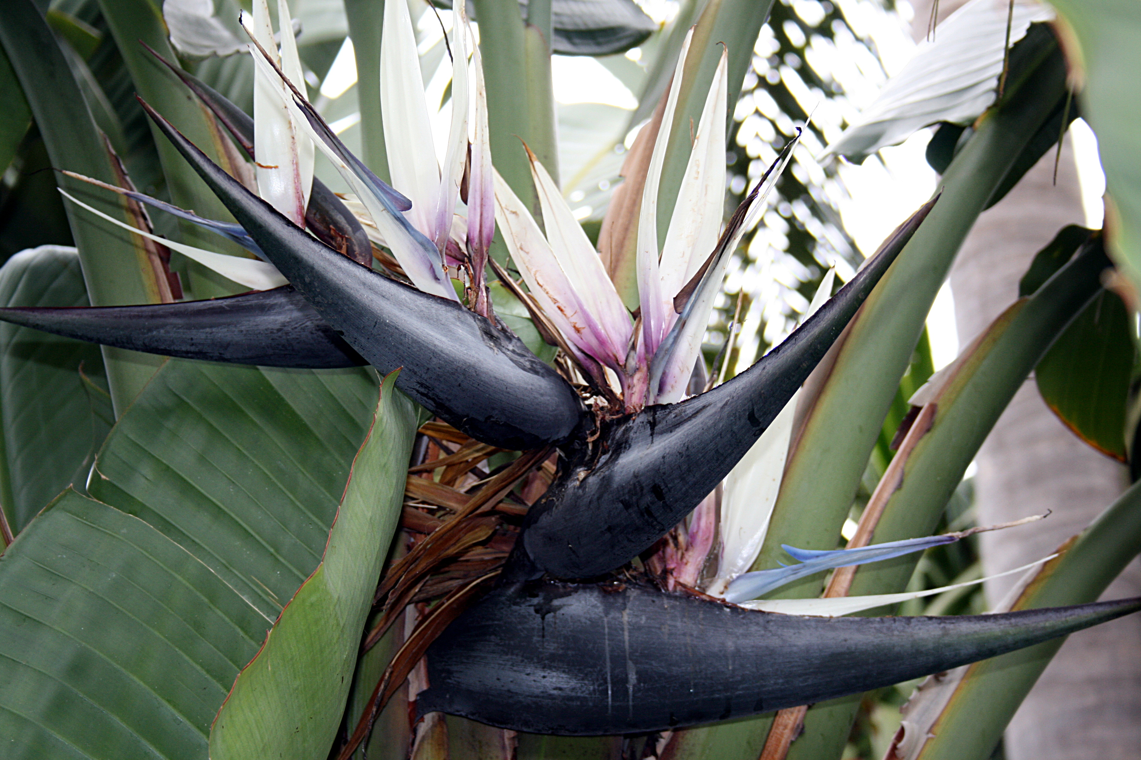 Madeira_botanischer_garten: Strelitzia Nicolai